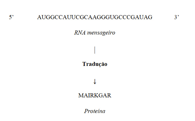 Processo de tradução (Mariano et al., 2015)